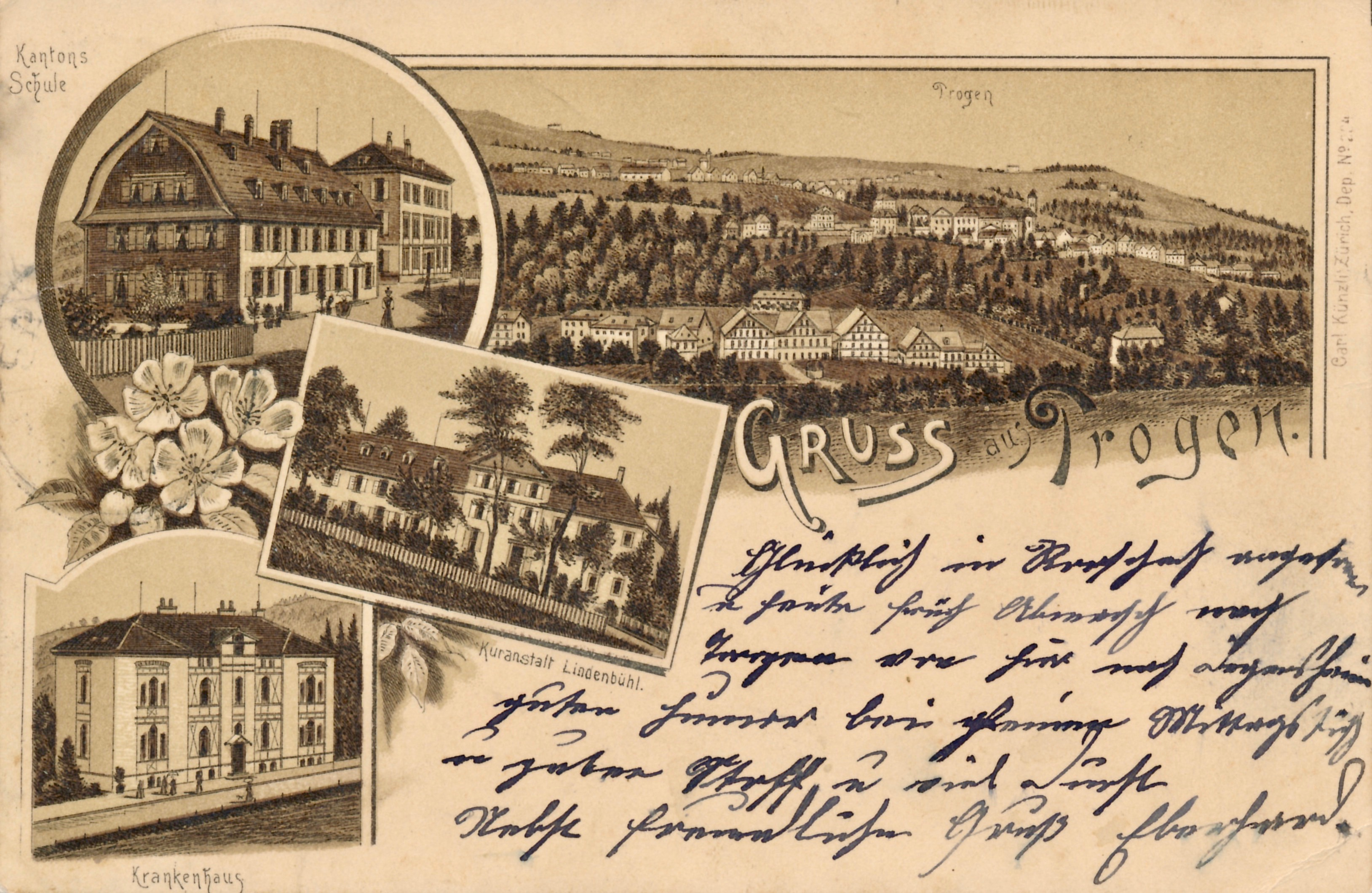 Postkarte von Trogen mit Kantonsschule, Krankenhaus und Kuranstalt Lindenbühl. Text: «Glücklich in Rorschach angekommen u. heute früh Abmarsch nach Trogen von hier nach Degersheim. Guter Humor bei Pfenninger Mittagstisch u. guter Stoff u. viel Leute. Bester freundlicher Gruss. Eberhard»